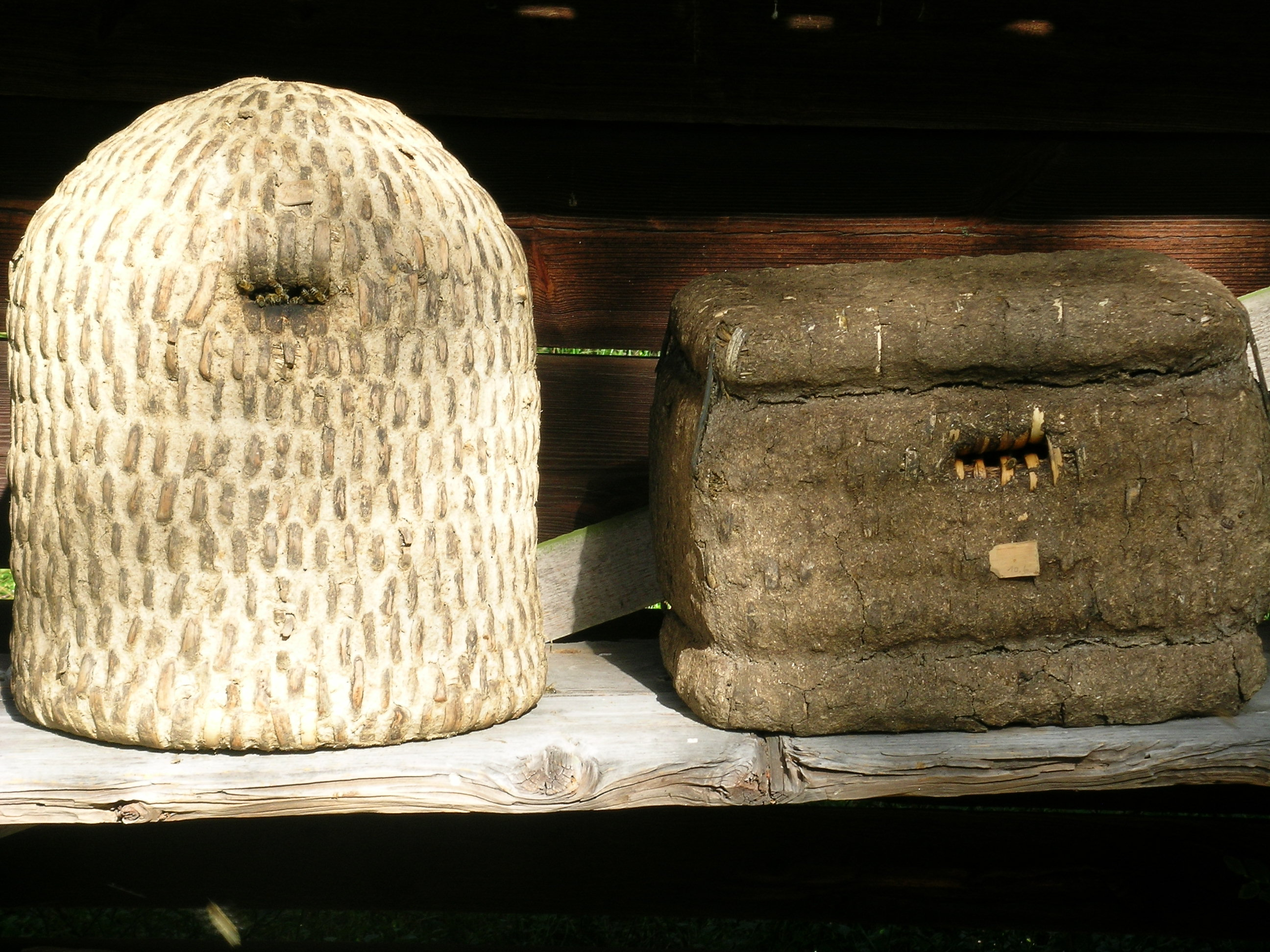 Lüneburger Heidestülper und viereckiger Kanitzkorb, aus Stroh